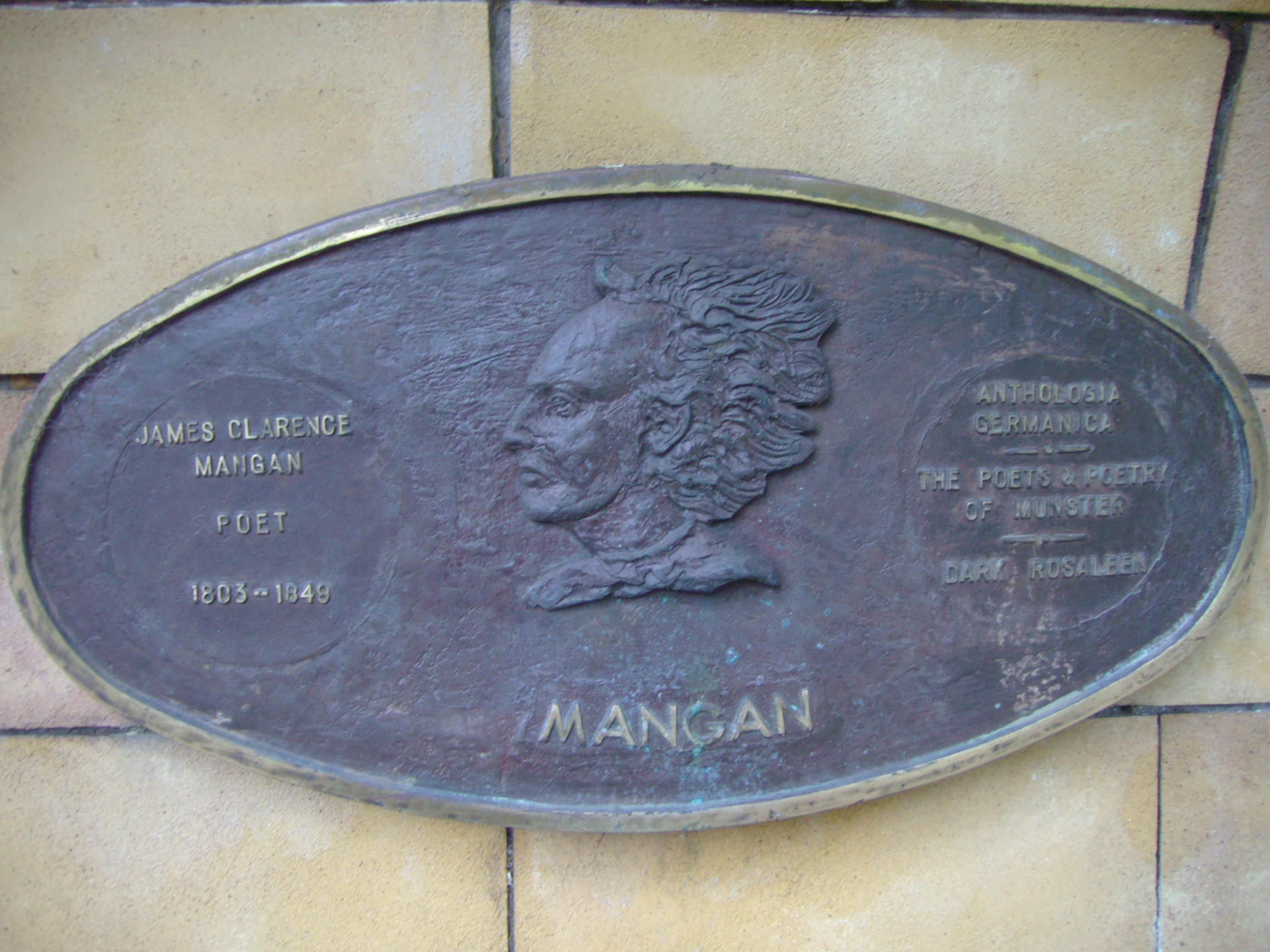 James Clarence Mangan (1803–1849), irischer Dichter; Plakette im Saint Patrick's Park, Dublin, dort angebracht anlässlich der Dublin Millennium 988–1988 Literary Parade